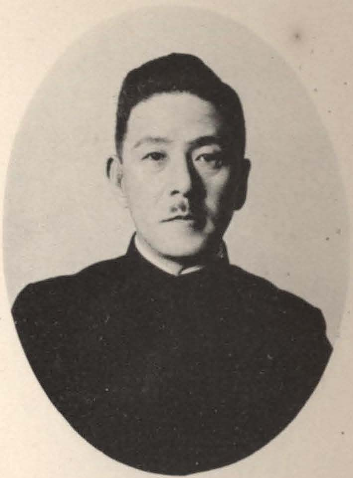 Bân-lâm-gú: 戸水昇 Tomizu Noboru